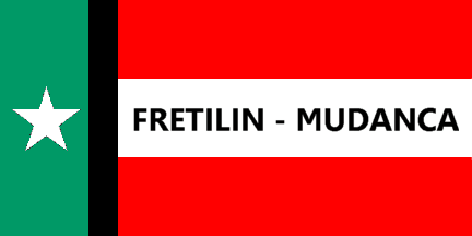 Flagge der osttimoresischen Partei FRETILIN Mudança nach Bild vom 7. Juli 2011